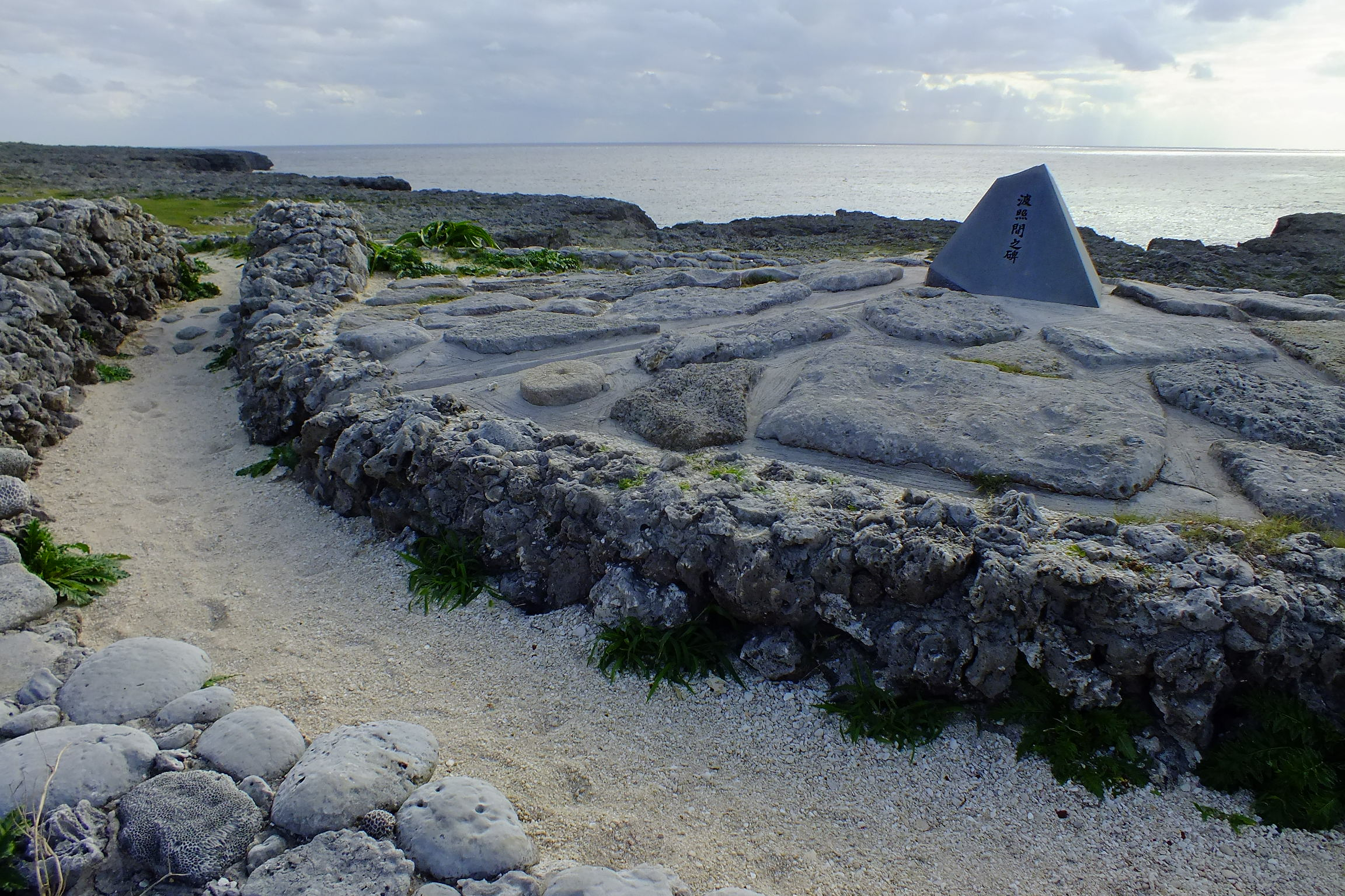 2015-12-17 Haterumajima 日本最南端の碑